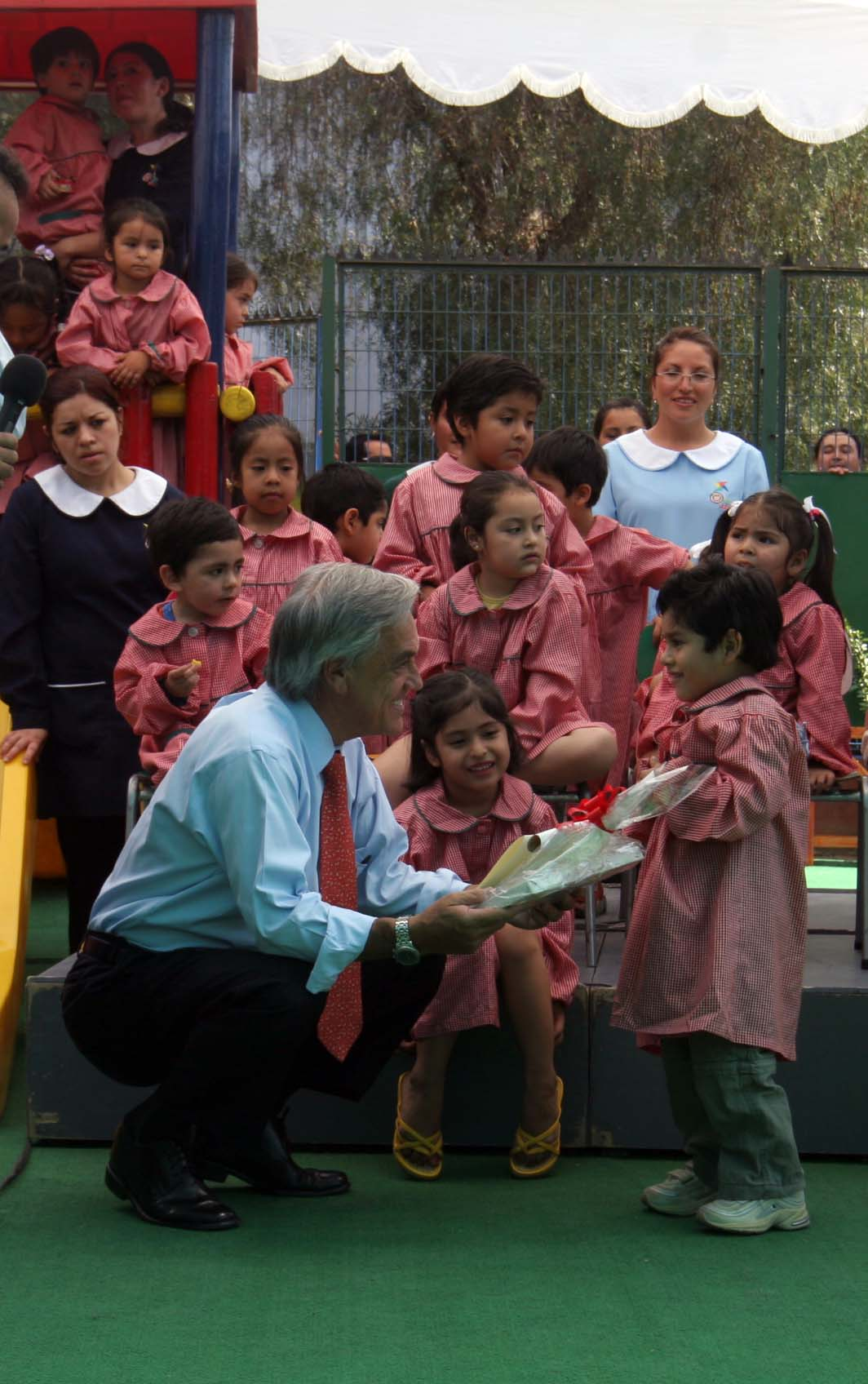 Jardin Infantil en Santiago